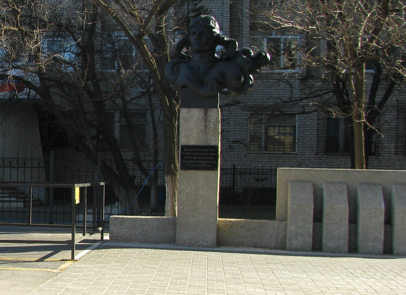 Бюст Хользунова напротив школы ДОСААФ в Волгограде